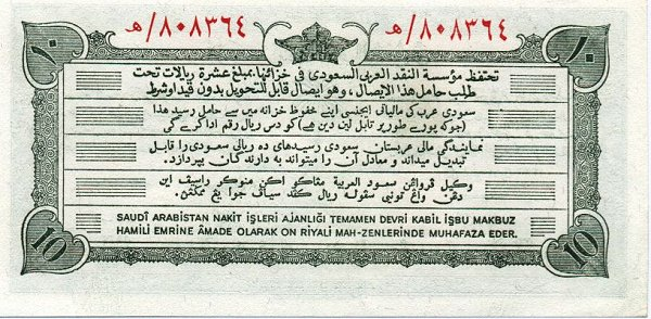 10 риалов. Саудовская Аравия, 1953. Реверс.